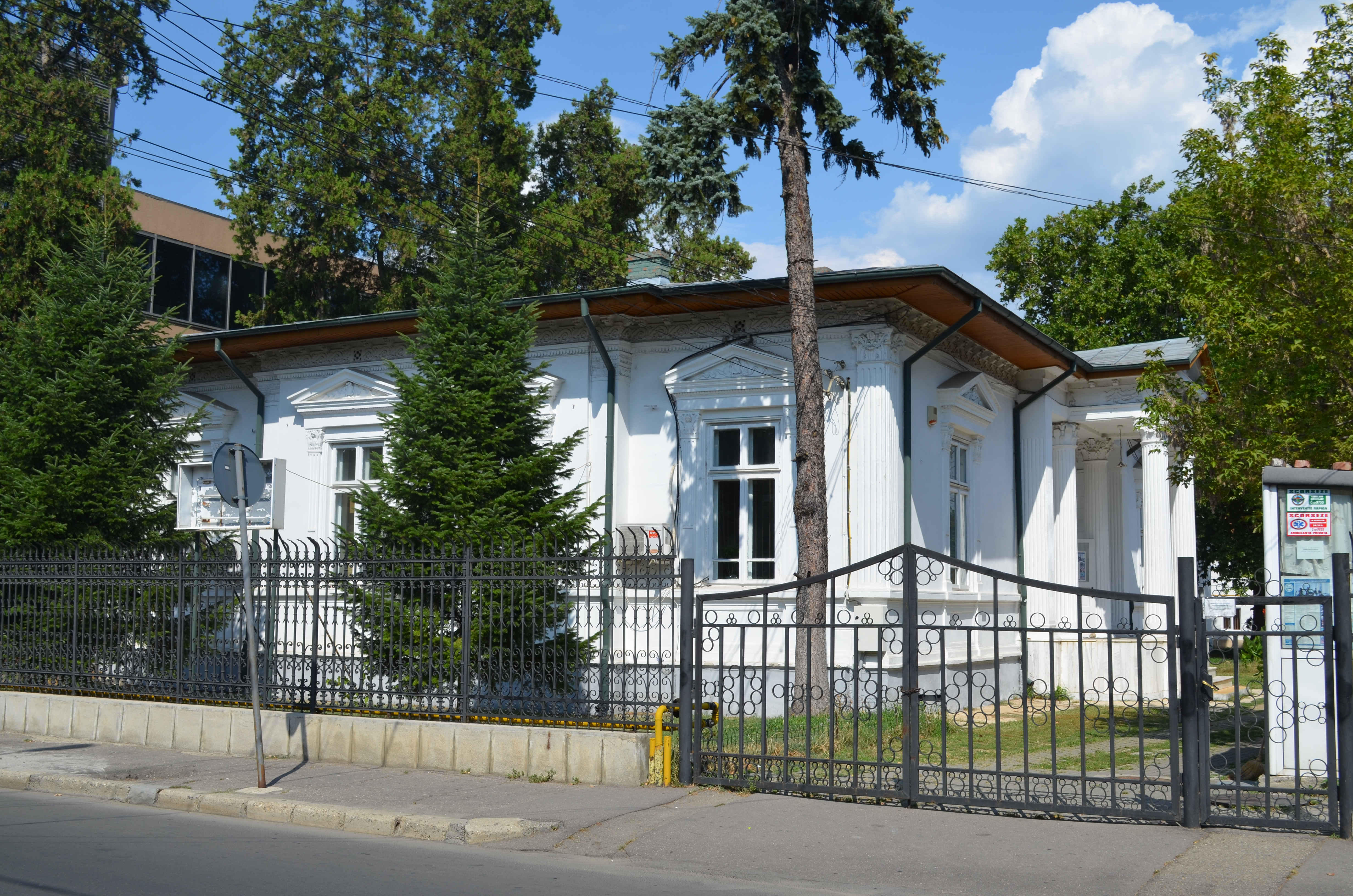 Casă, Str. Democrației nr. 17, azi sediul CTID Ploiești al Universității "Spiru Haret", Ploiești